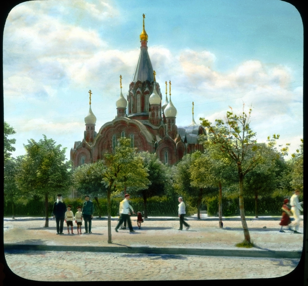 Москва. Храм Воскресения Христова в Сокольниках